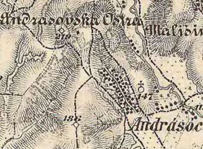 Андріївка карта1869